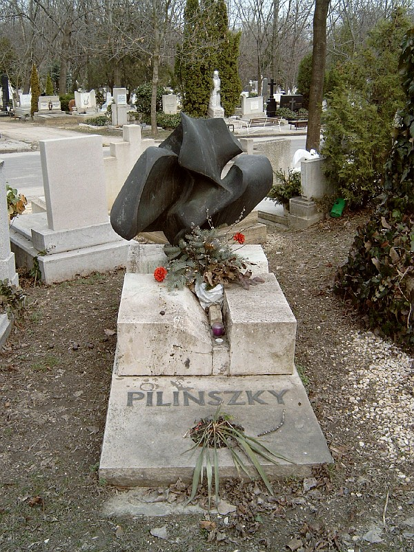 Pilinszky János sírja Budapesten. Farkasréti temető: 22-1-94.